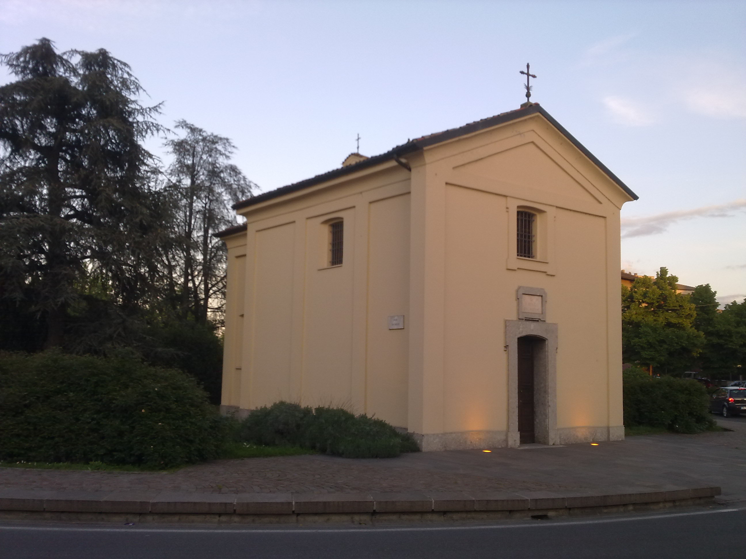 Facciata e vista laterale della Chiesetta di San Biagio, a Buccinasco